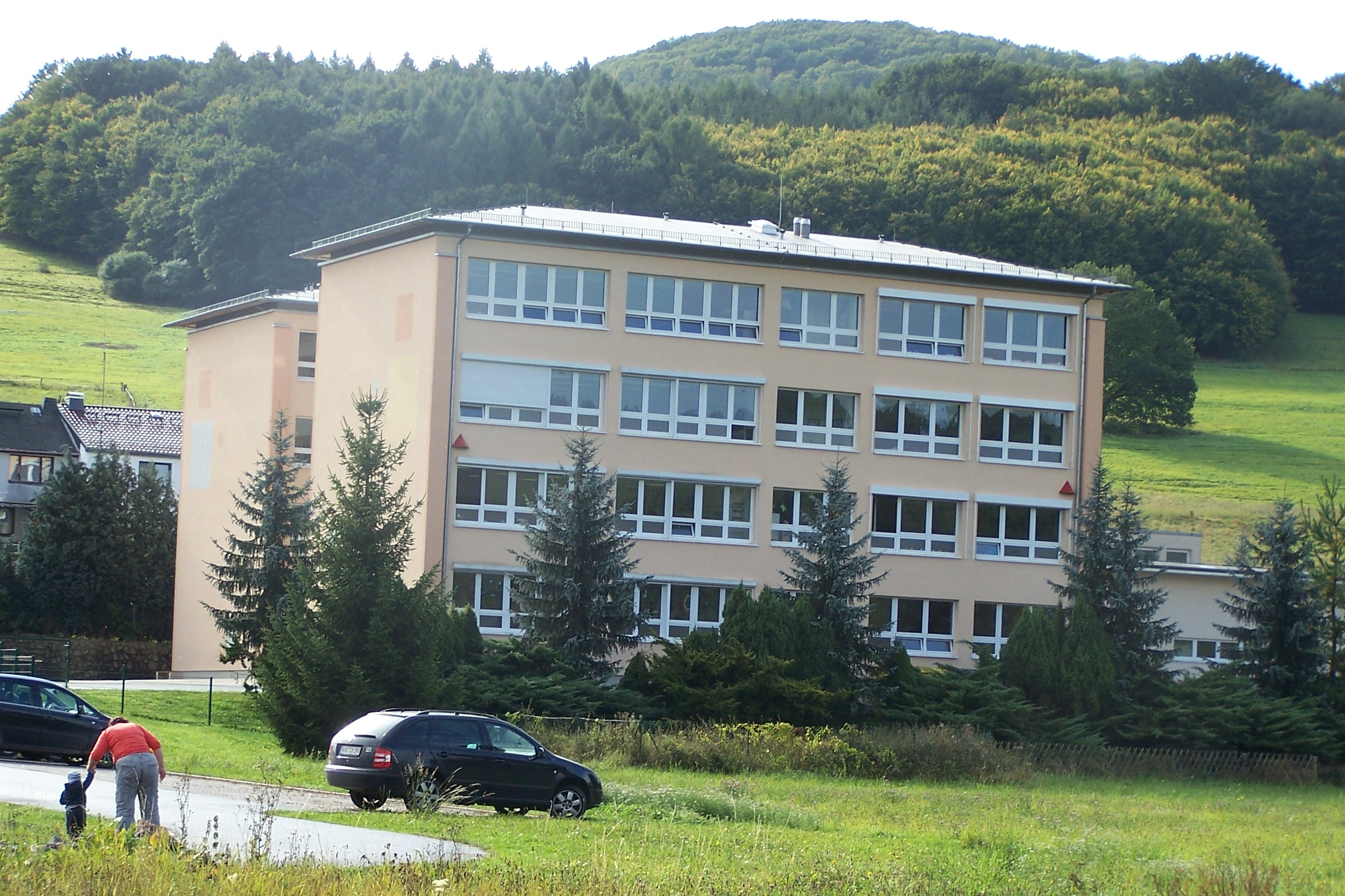 Blick von Süden auf die Staatliche Regelschule in Unterbreizbach.